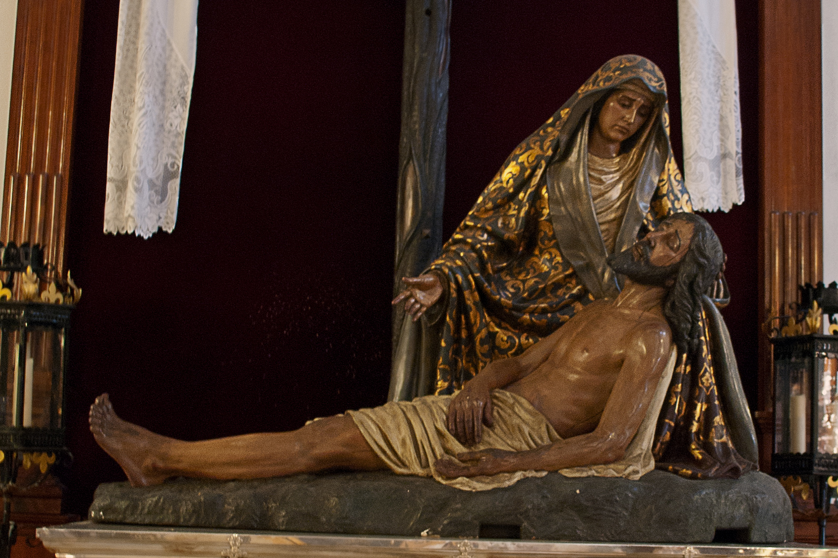 Mauseoleo de Antonio Castillo Lastrucci en la iglesia de San Julián (Sevilla, España)